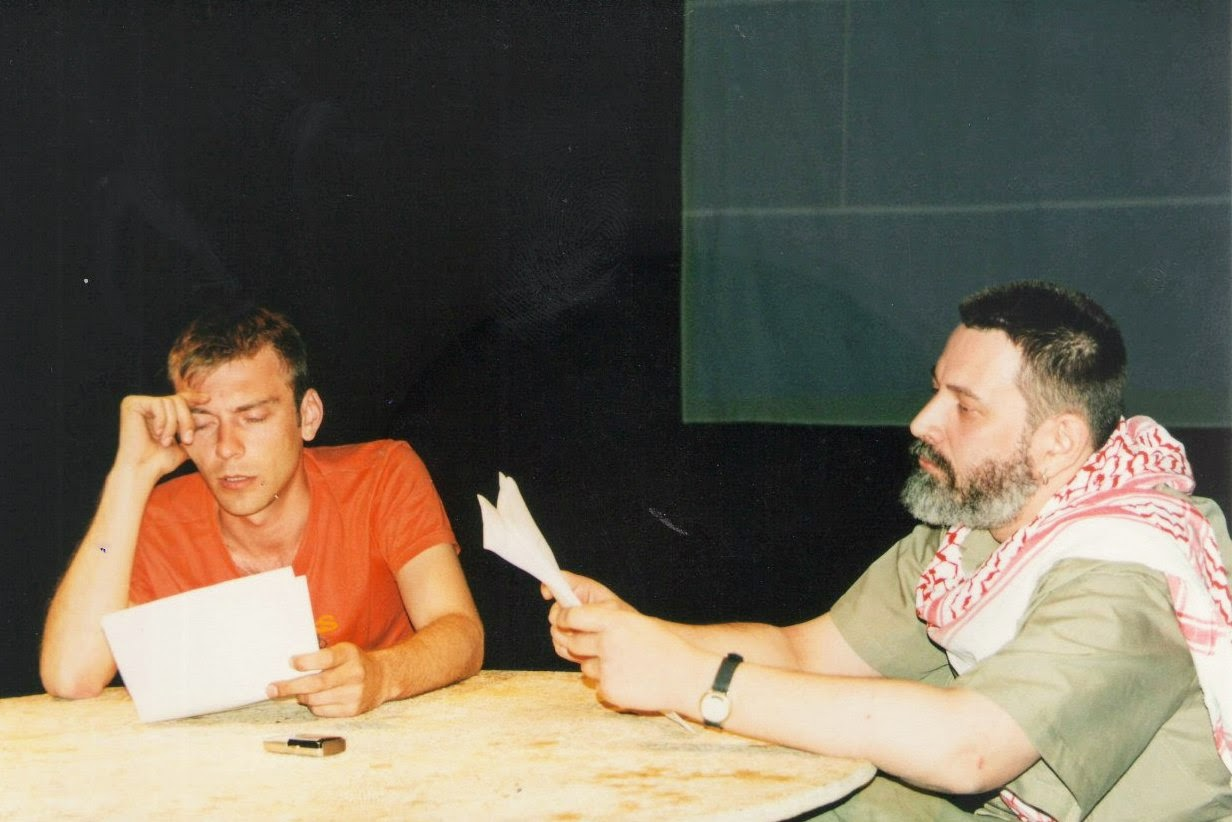 Михаил Дурненков, Вадим Леванов. Читка пьесы. Фестиваль "Майские чтения", театральный центр "Голосова 20", Тольятти. Россия.